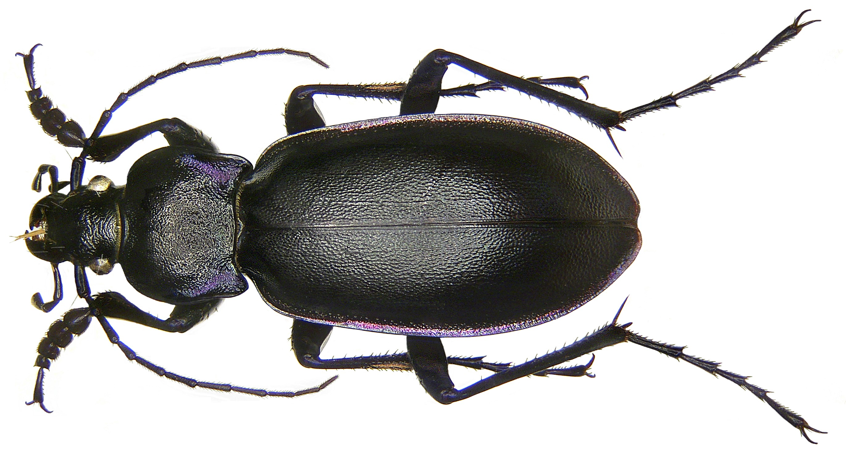 Familie: Carabidae Grösse: 22-40 mm Verbreitung: Europa Ökologie: besonders in Wäldern und Mooren Fundort: Hungaria, Budapest leg.det. O.Schmitt, 1979 Foto: U.Schmidt, 2008